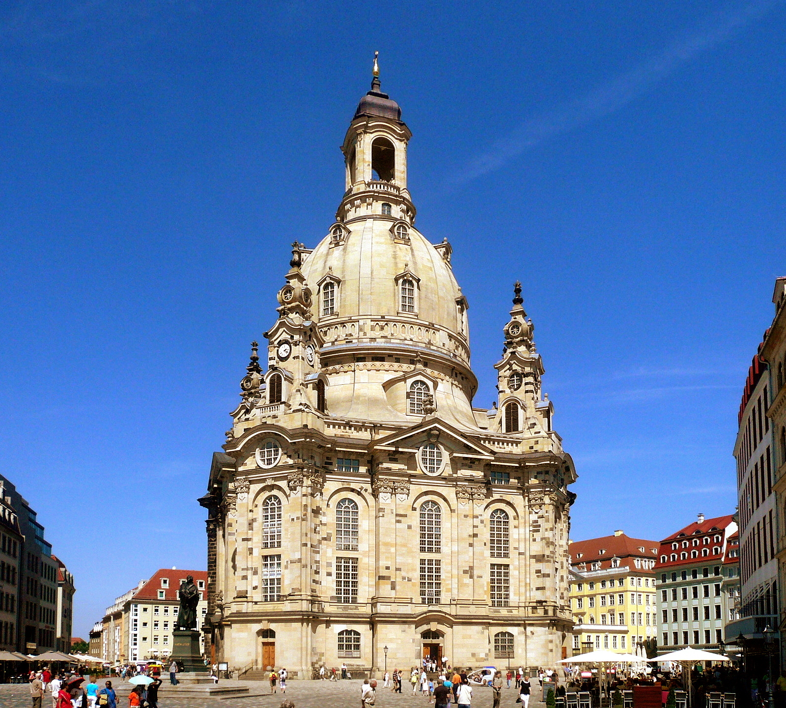 Frauenkirche in Dresden